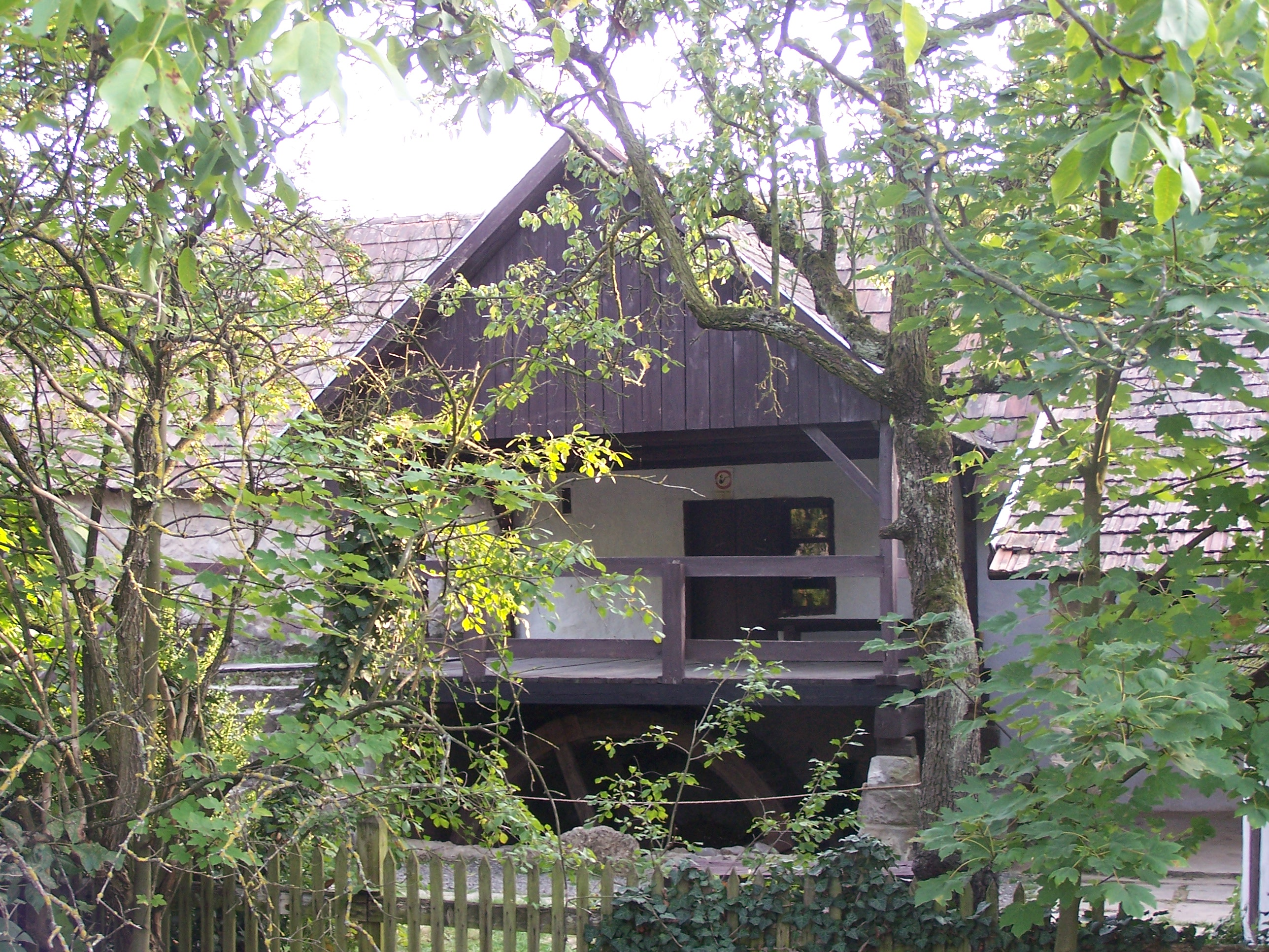 Vízimalom (Nagybörzsöny, Hunyadi tér 10 .) This is a photo of a monument in Hungary, Identifier: 7134